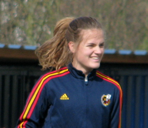 Irene Paredes Hernández, spanische Nationalspielerin